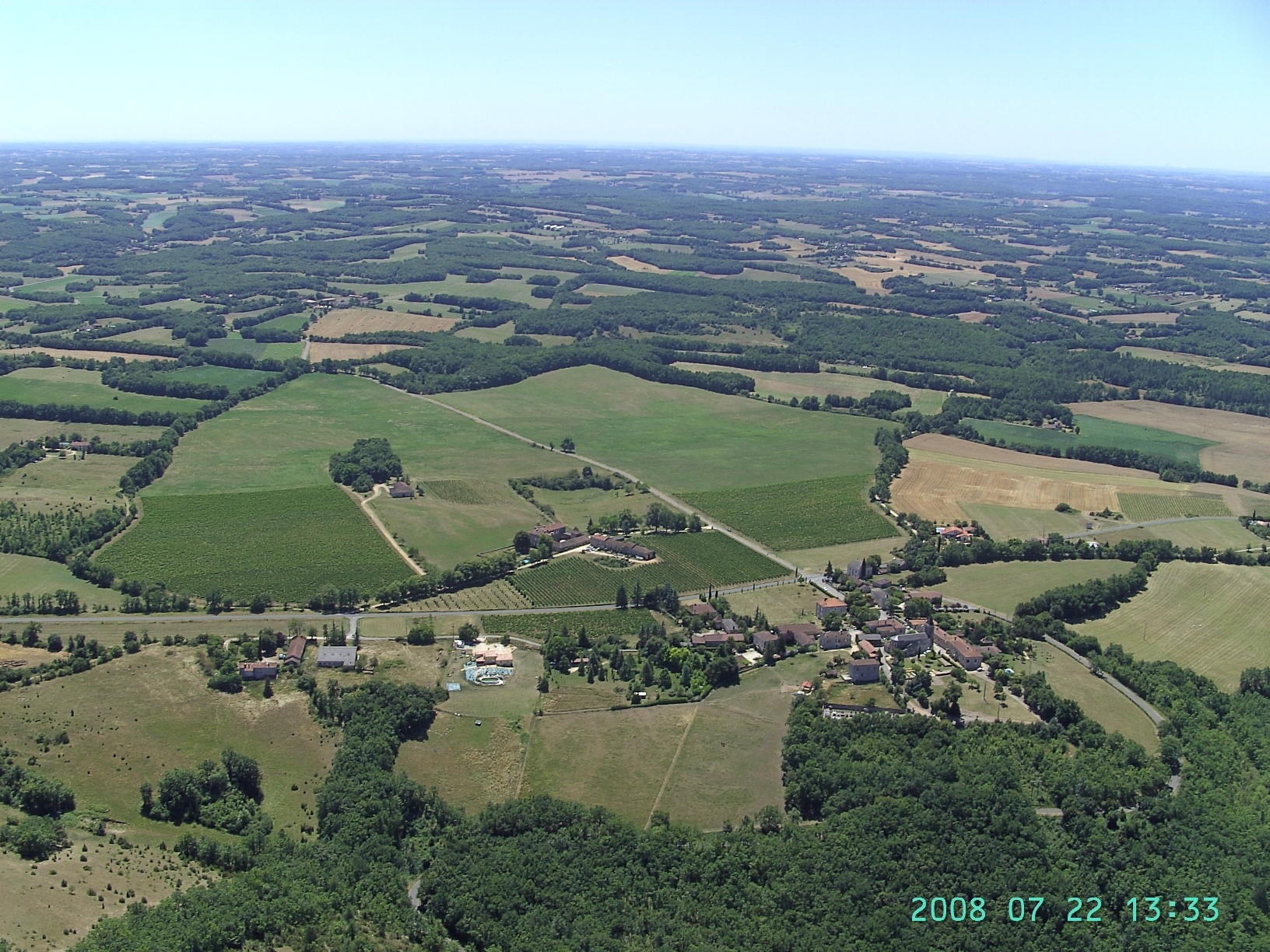 Vue du ciel du village de Lacapelle-cabanac